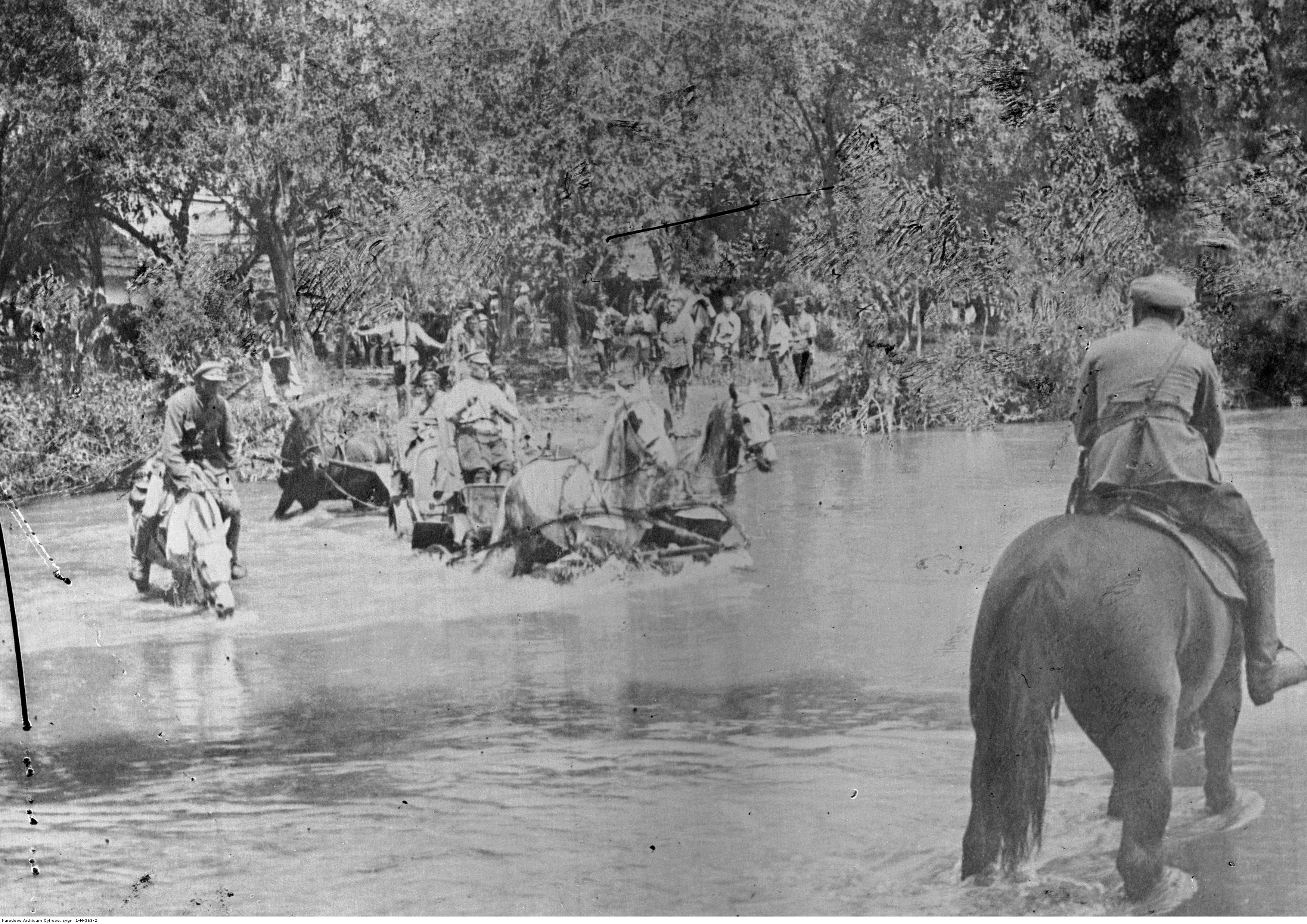 Walki polsko-ukraińskie: szwadron karabinów maszynowych (14 pułk ułanów) przechodzi przez rzekę Strypę; 1919 r. Koncern Ilustrowany Kurier Codzienny - Archiwum Ilustracji. Sygnatura: 1-H-363-2